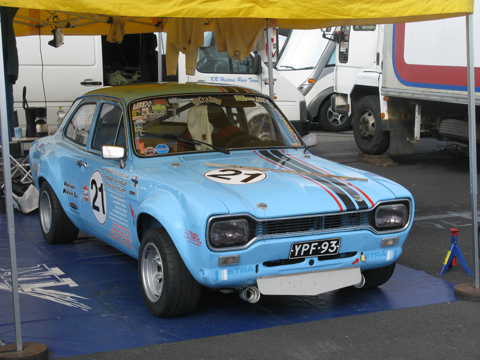 Ford Escort RS1600